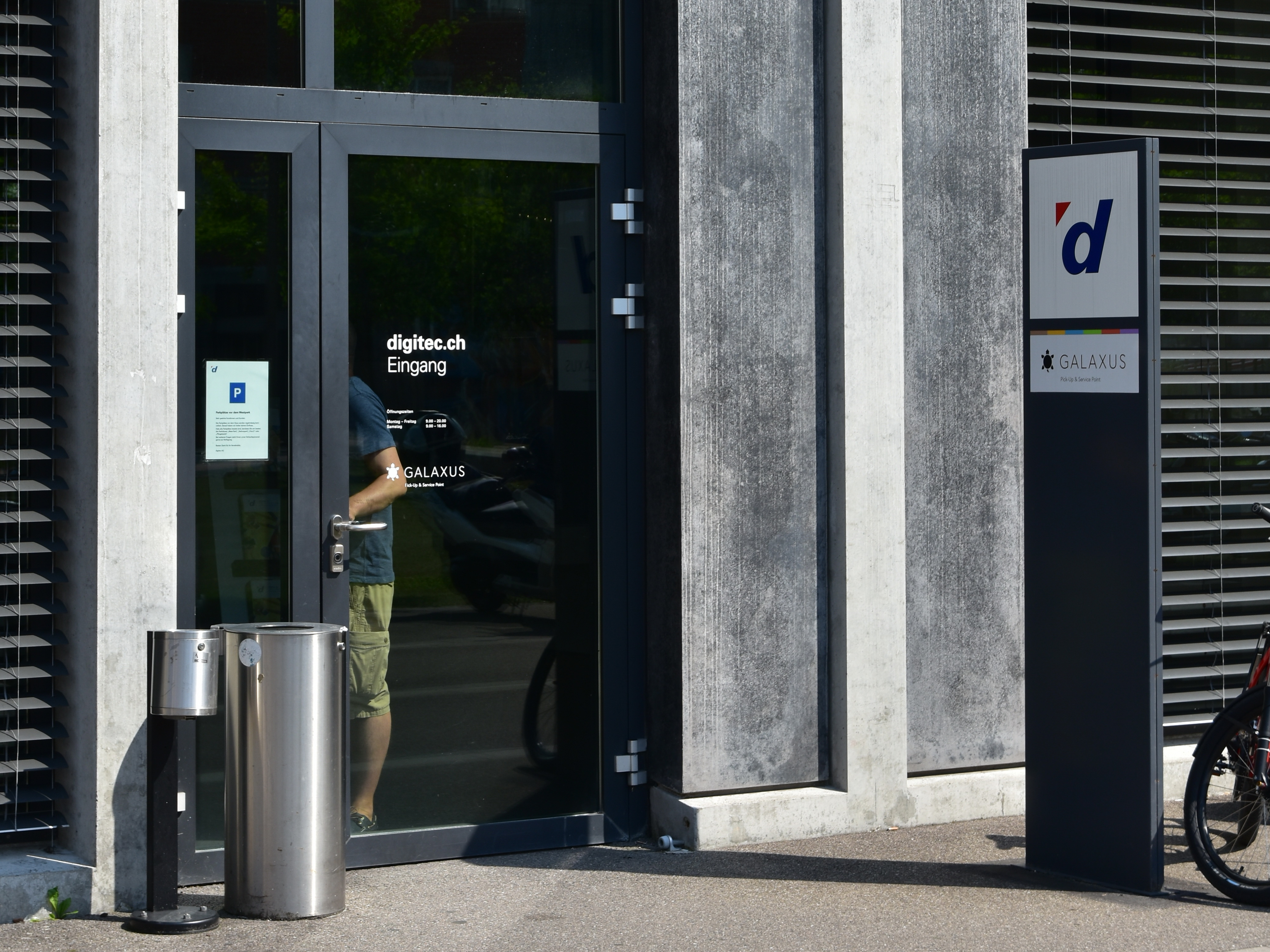 digitec shop, Technopark, Zürich-Industriequartier in Switzerland